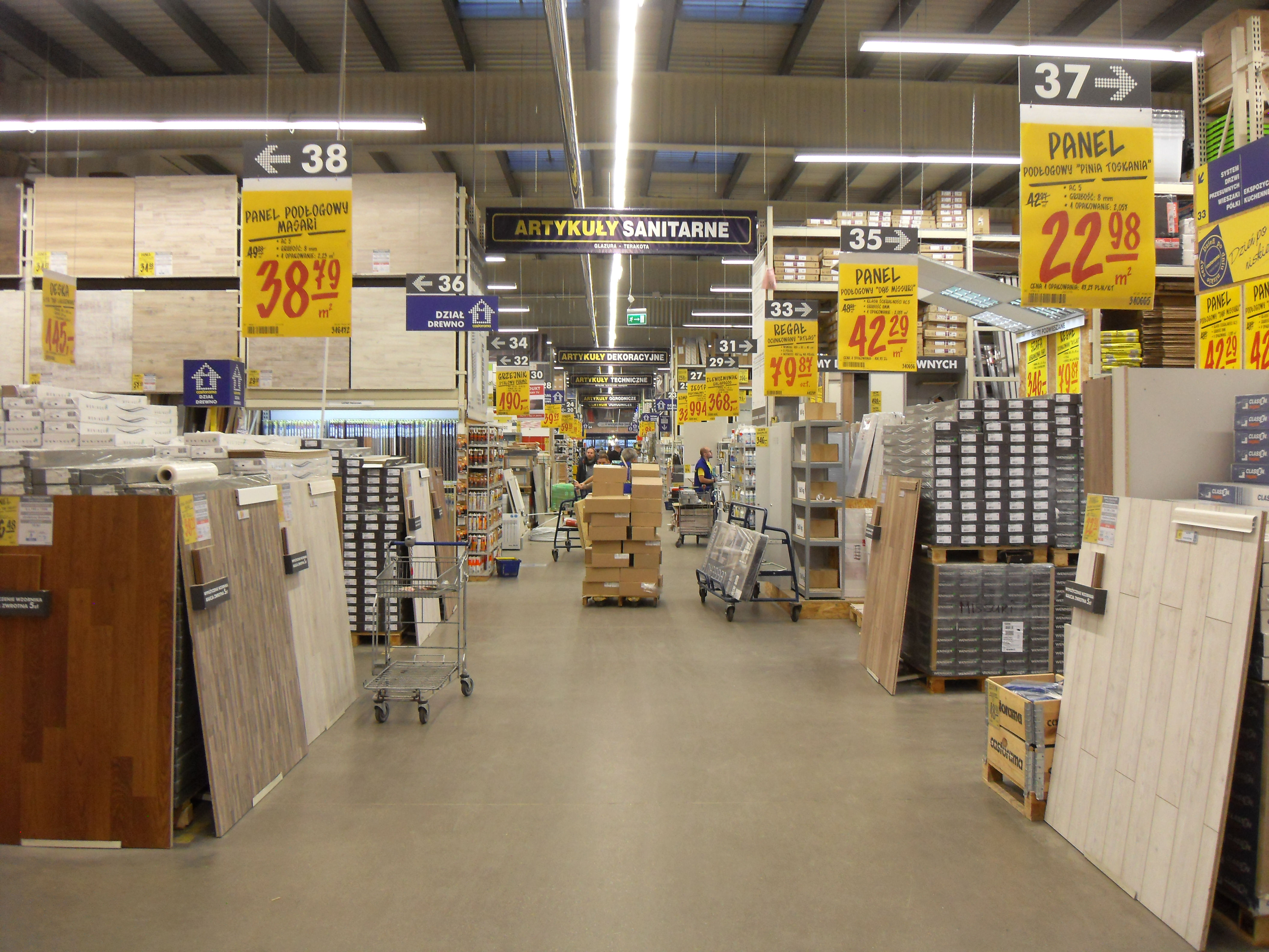 Gdańsk Oliwa. Al. Grunwaldzka 262, "Castorama".